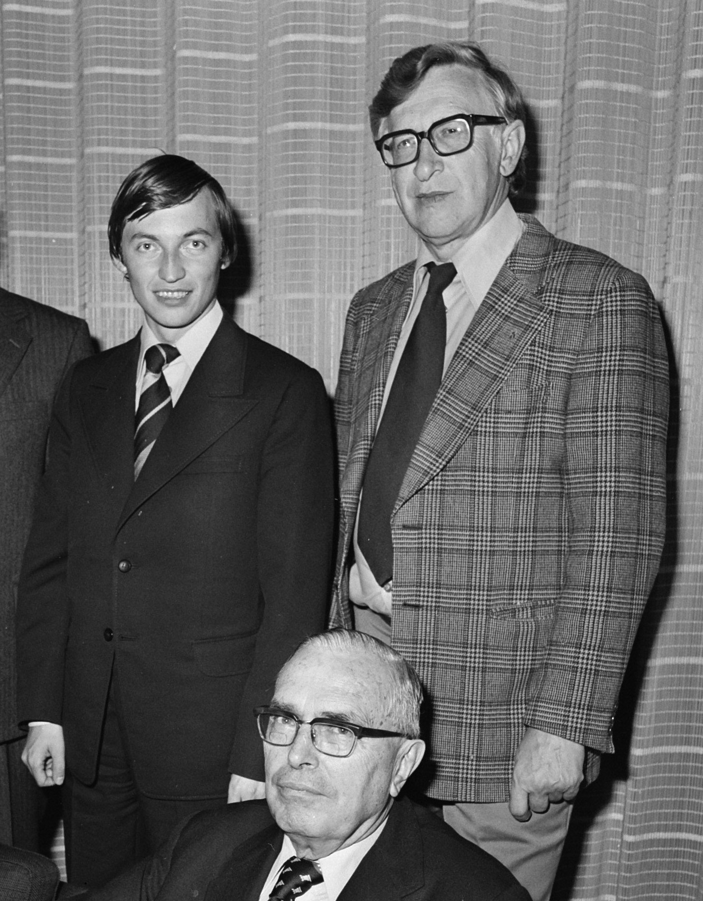 Collectie / Archief : Fotocollectie Anefo Reportage / Serie : [ onbekend ] Beschrijving : Aankomst schakers Smyslov en Karpov op Schiphol Datum : 21 september 1977 Locatie : Noord-Holland, Schiphol Trefwoorden : aankomsten, schakers Persoonsnaam : Karpov, Anatoli Fotograaf : Croes, Rob C. / Anefo Auteursrechthebbende : Nationaal Archief Materiaalsoort : Negatief (zwart/wit) Nummer archiefinventaris : bekijk toegang 2.24.01.03 Bestanddeelnummer : 929-3592